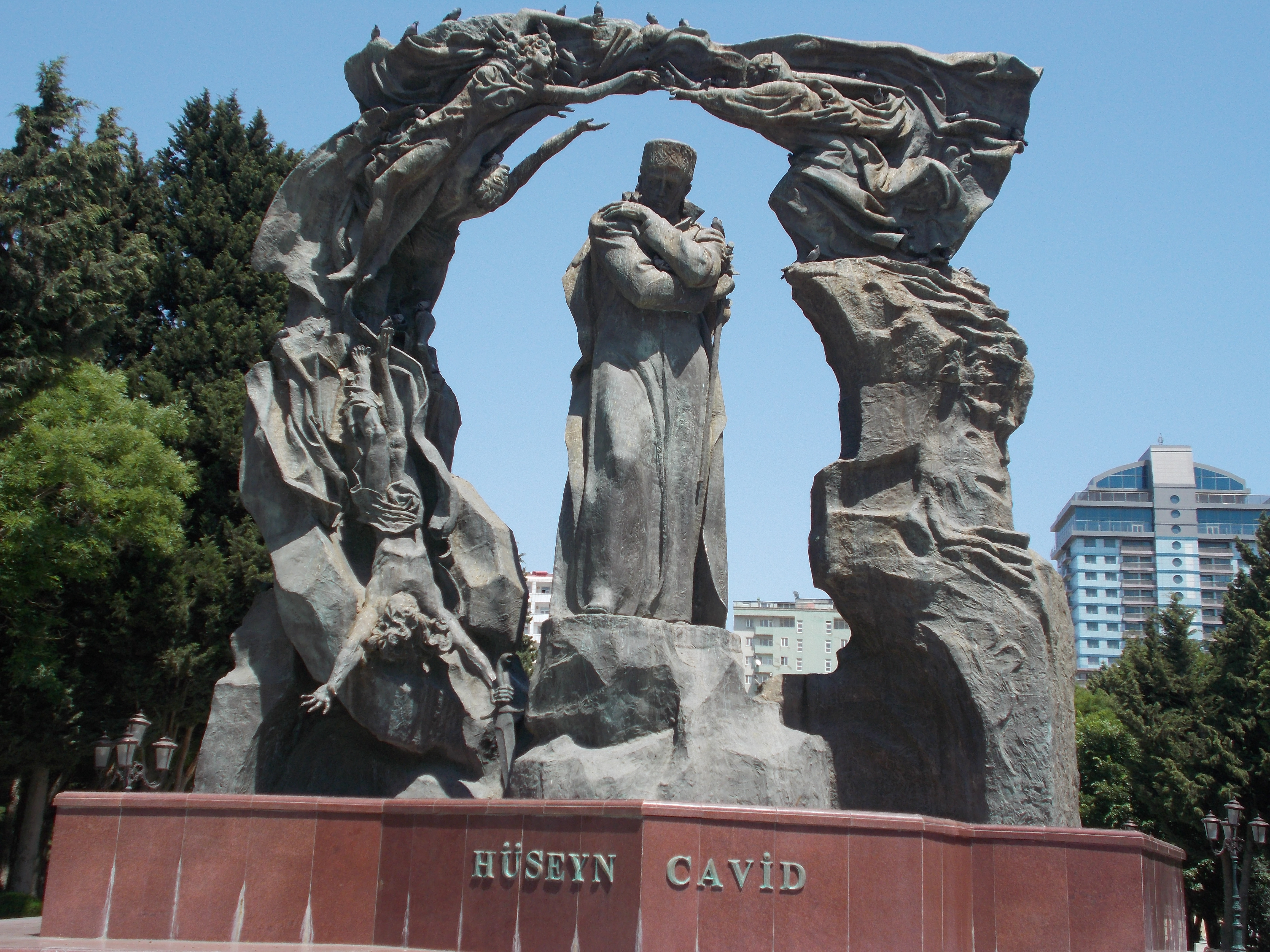 Hüseyn Cavid Parkındaki Hüseyn Cavid Heykəli